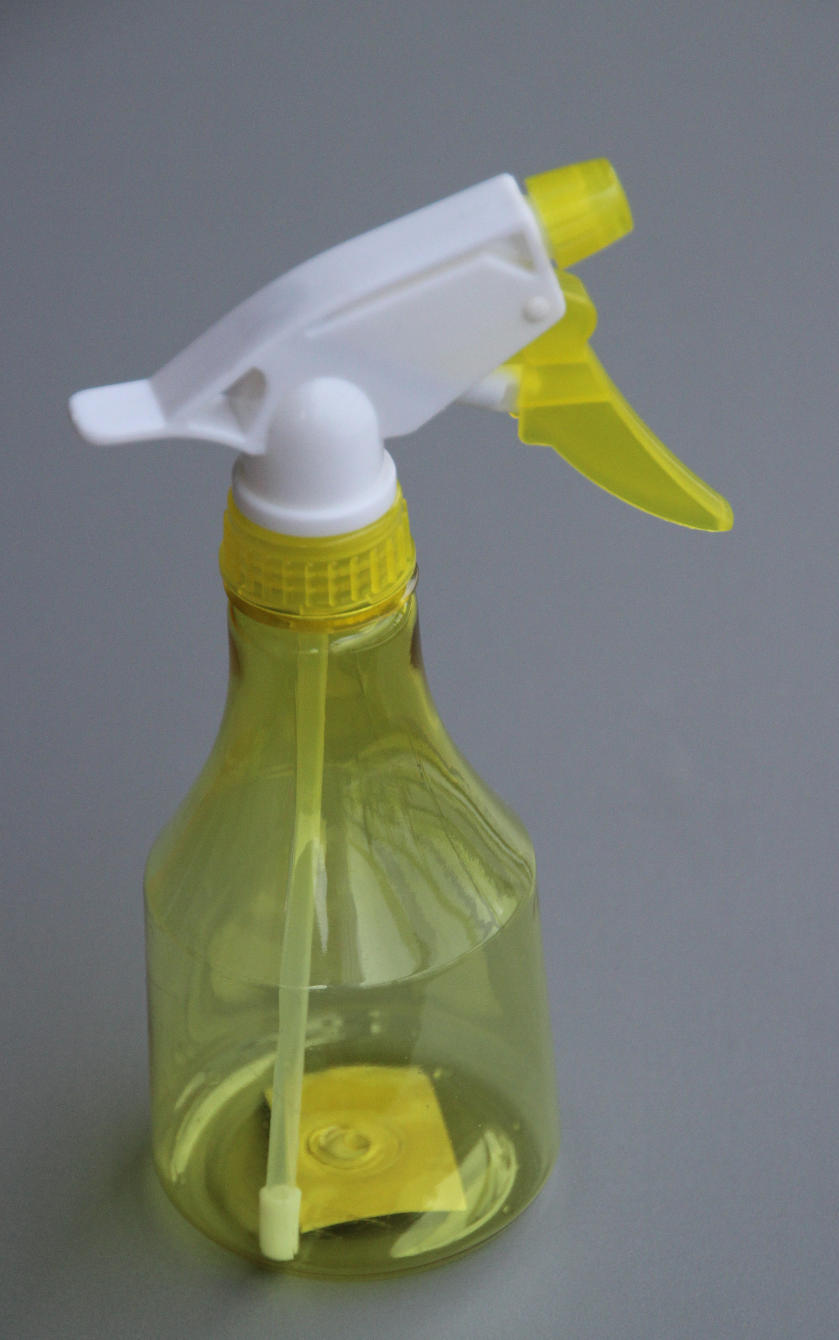 Bildinhalt: Gelbe Sprühflasche mit weißem Kopf Aufnahmeort: Frankfurt am Main, Deutschland